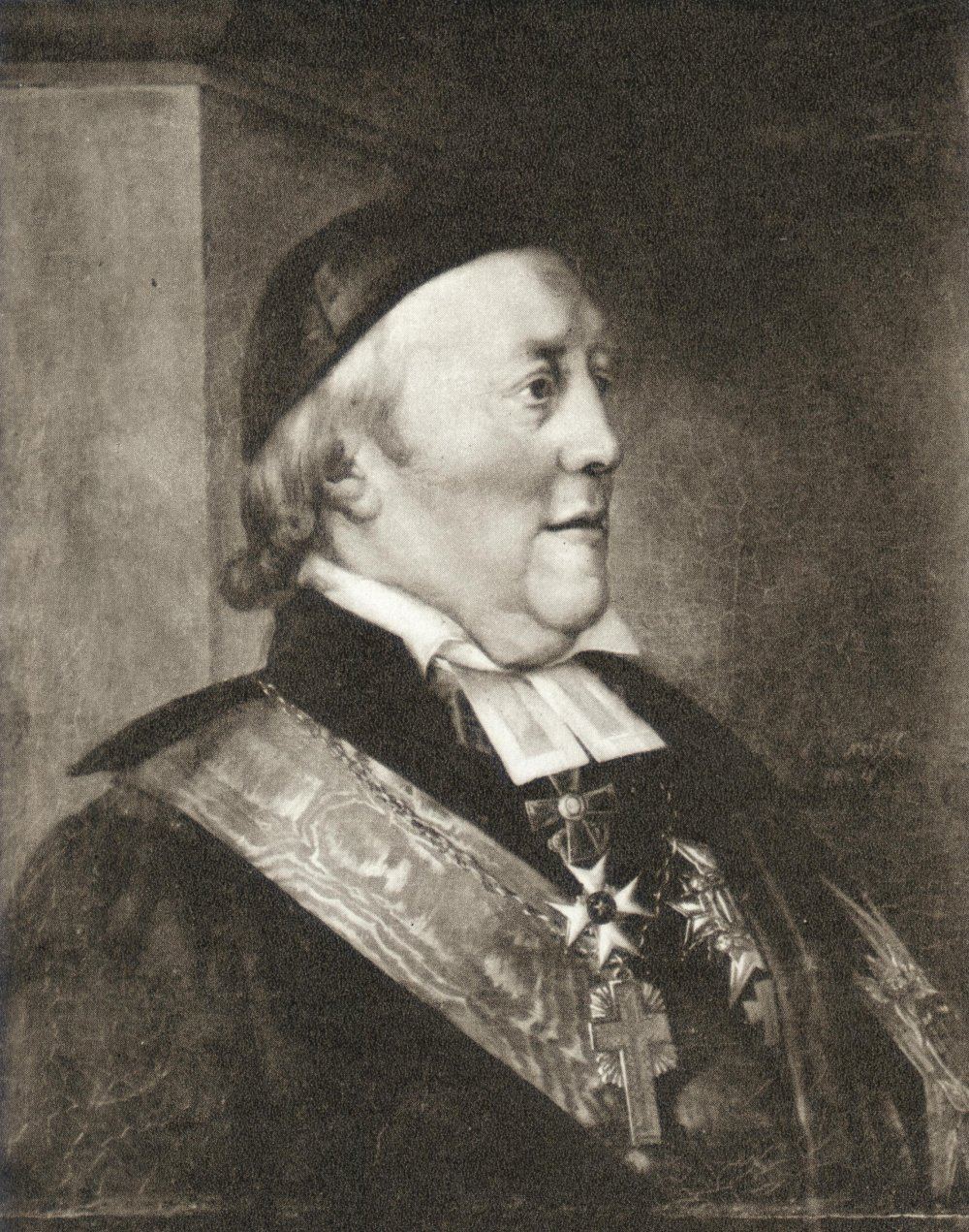 Carl von Rosenstein (1766-1836), ärkebiskop i Uppsala